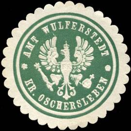 Sealing stamp Title: Amt Wulferstedt Kreis Oschersleben Description: geprägt, grün, weiß Place: Wulferstedt size: 3 cm